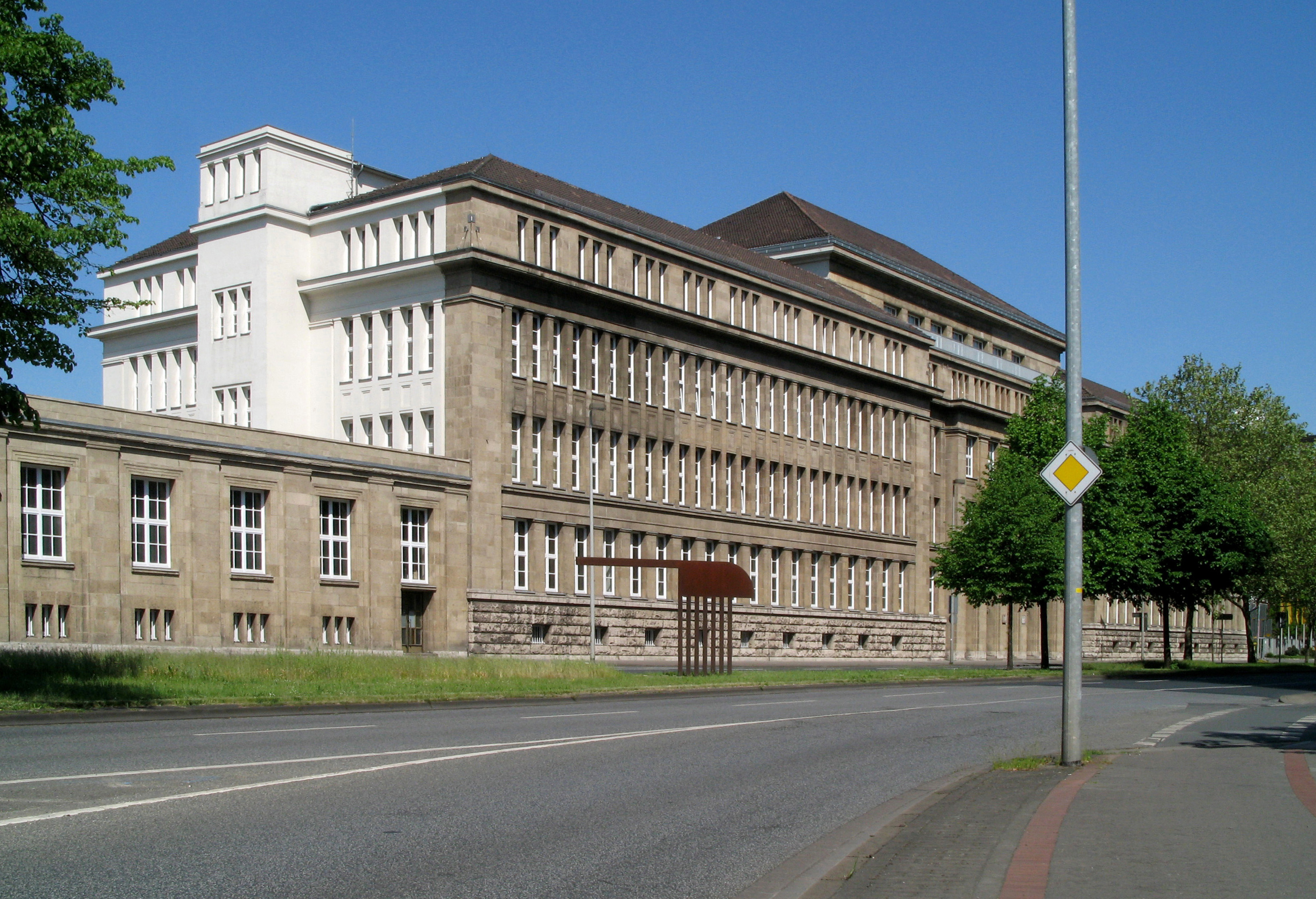 "o.T.", Corten-Stahl, 460x285x3cm, Standort: Hannover/ Vahrenwalder Str.